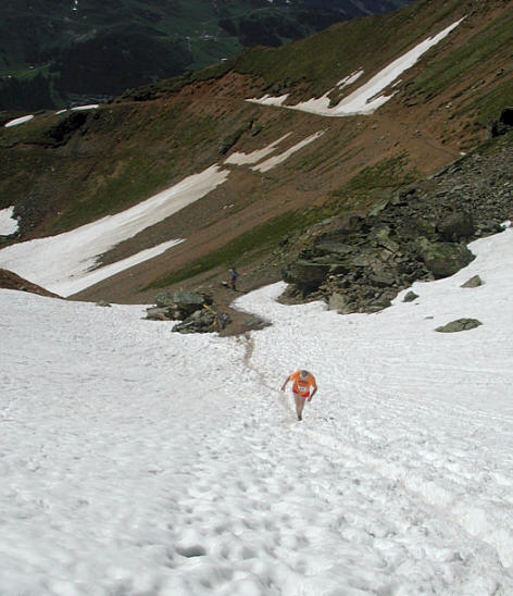 Steiles Schneefeld bei Kilometer 41 beim Graubünden-Marathon 2004.